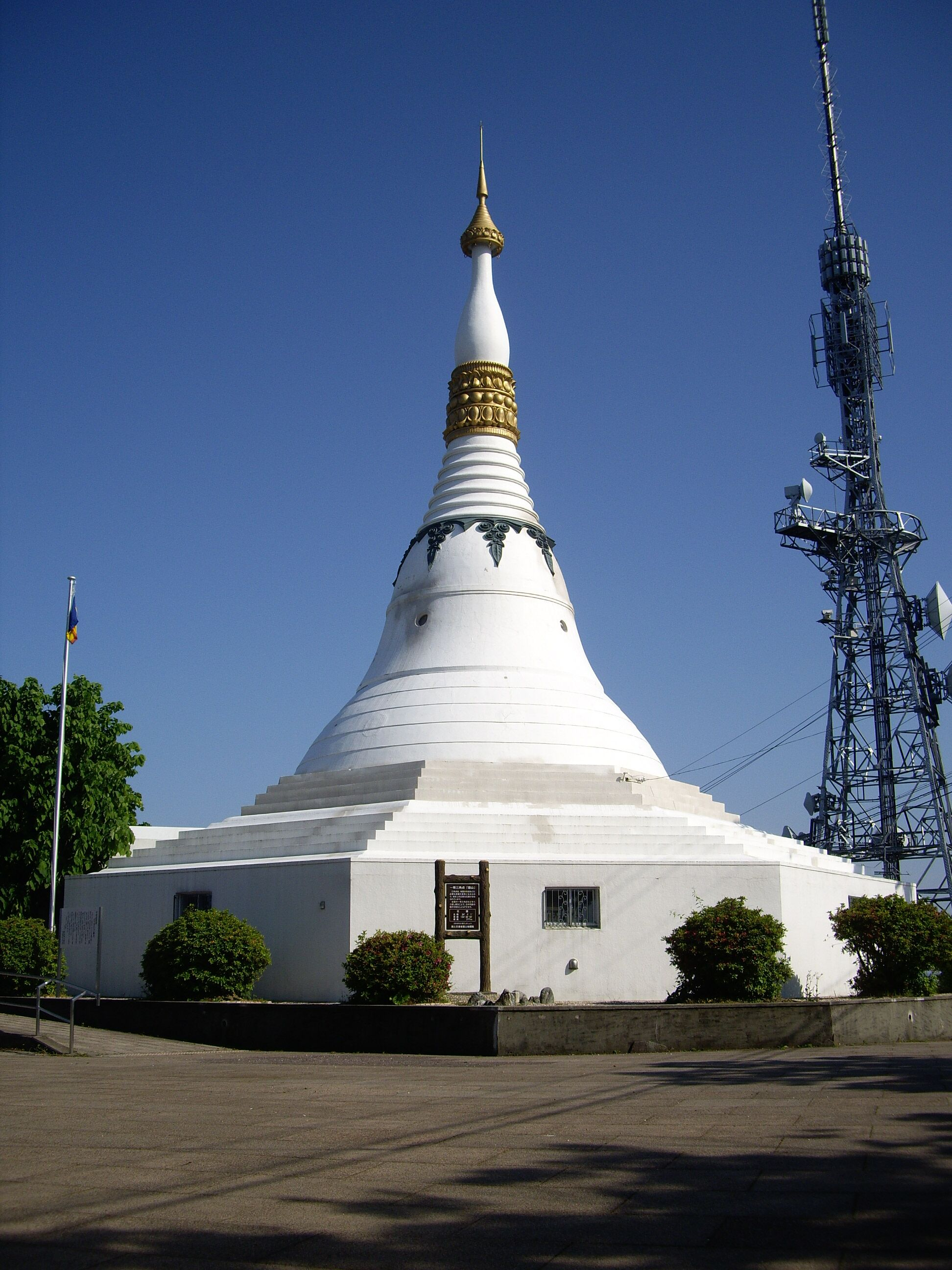 平和記念塔パゴダ - 徳島県徳島市眉山町